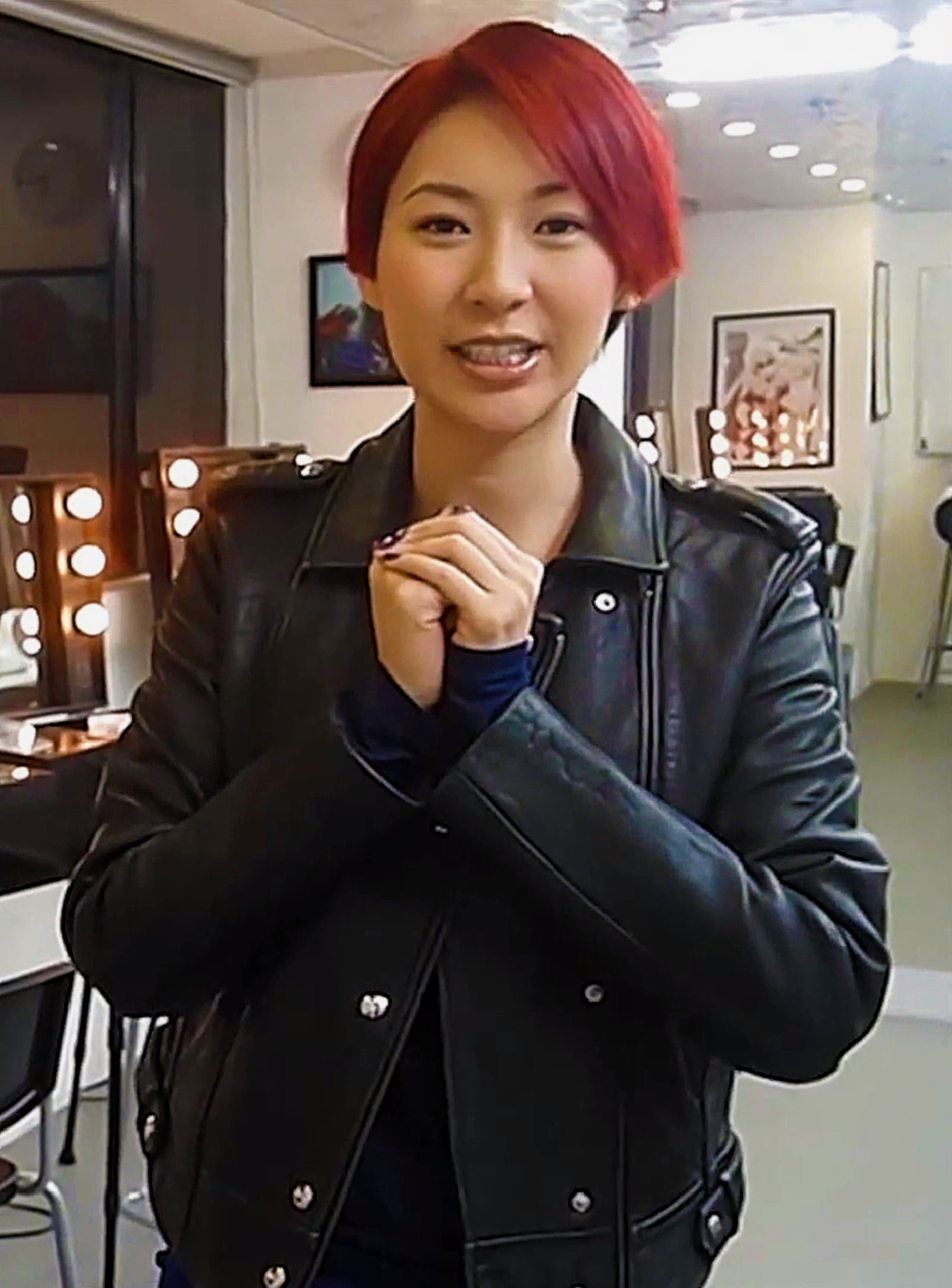 中文（香港）: 香港女性模特兒、演員和主持，父親是馬來西亞拿督兼中國光大控股有限公司創辦人莊寶，其孿生胞妹莊思華及莊思明均為香港藝人